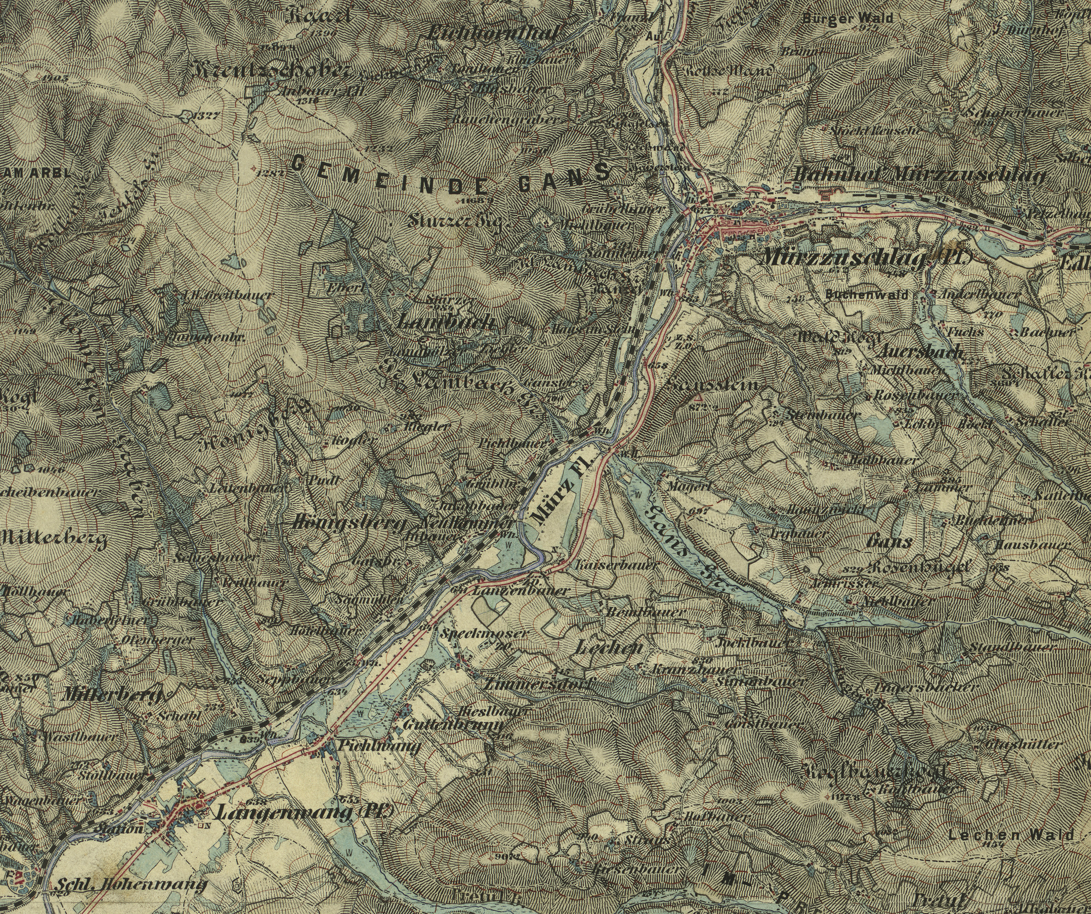 Langenwang-Mürzzuschlag aus der historischen Landkarte: Gradkartenblatt Zone 15 Colonne XIII Section SO (Südost) (später 4955/4). Mürzzuschlag, Steinhaus, Langenwang, Alpl, Pretul, Stuhleck, Rettenegg, Pfaffensattel, Fröschnitz. Franzisco-josephinische (3.) Landesaufnahme der österreichisch-ungarischen Monarchie. Aufnahmeblatt 1:25.000. Aufgenommen 1876/77